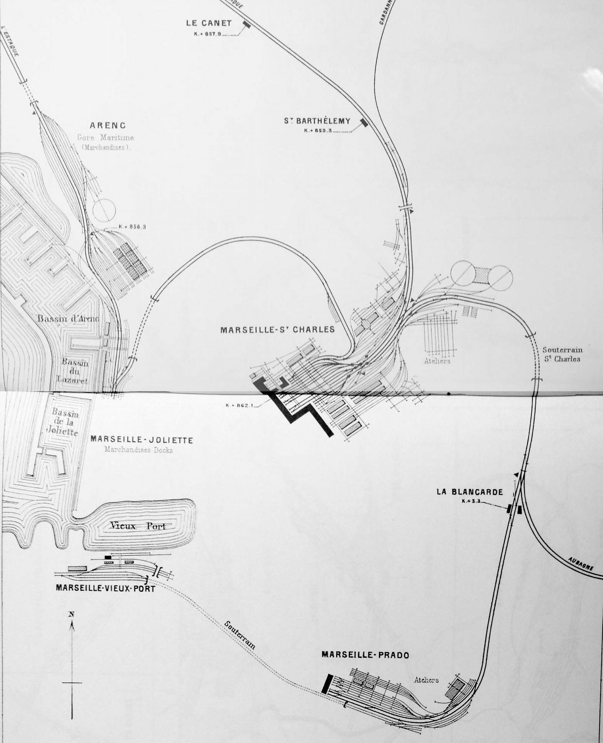 Croquis des Bifurcations et Gares principales de Marseille en 1904.